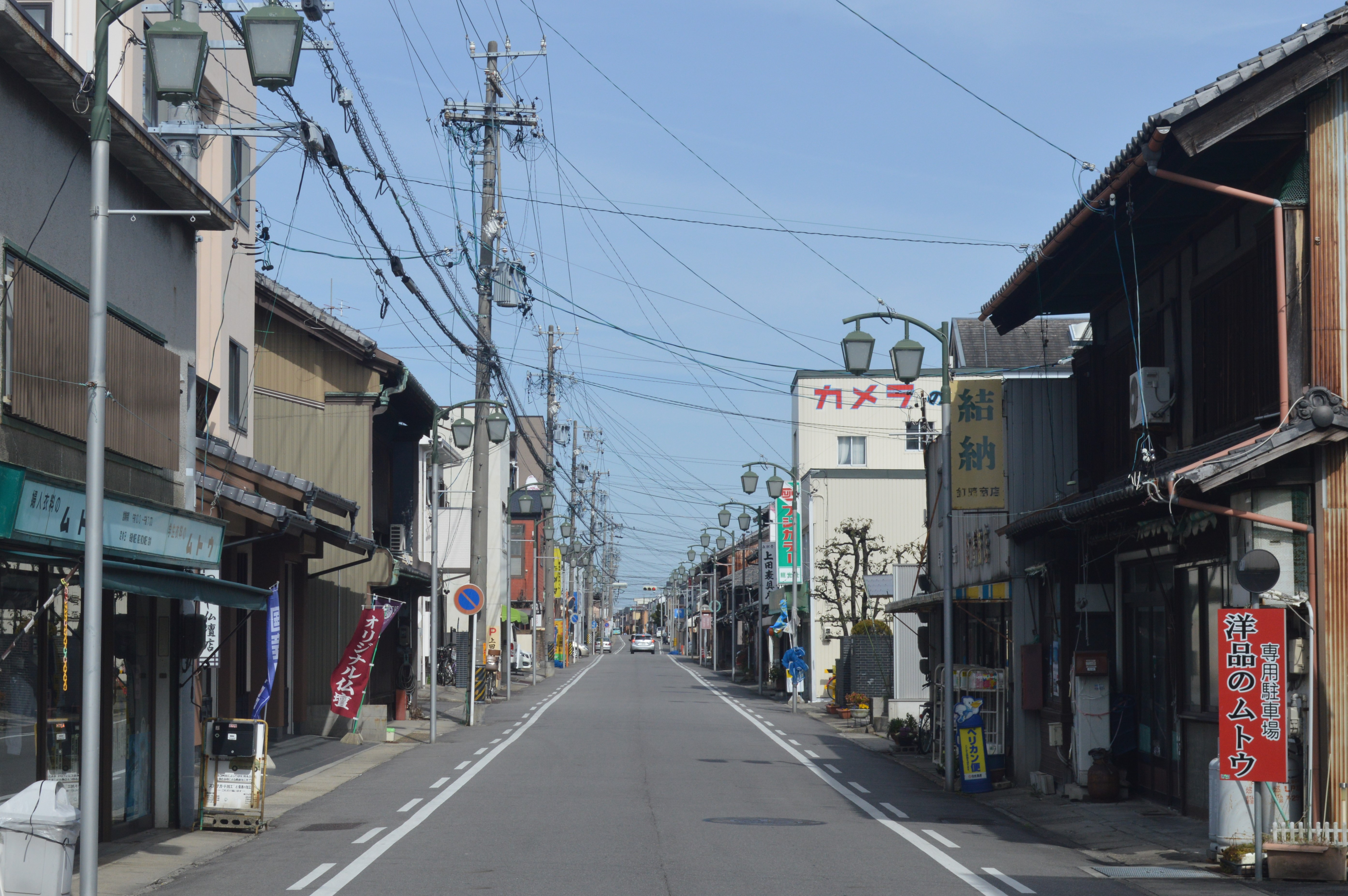 愛知県西尾市にある肴町通り。